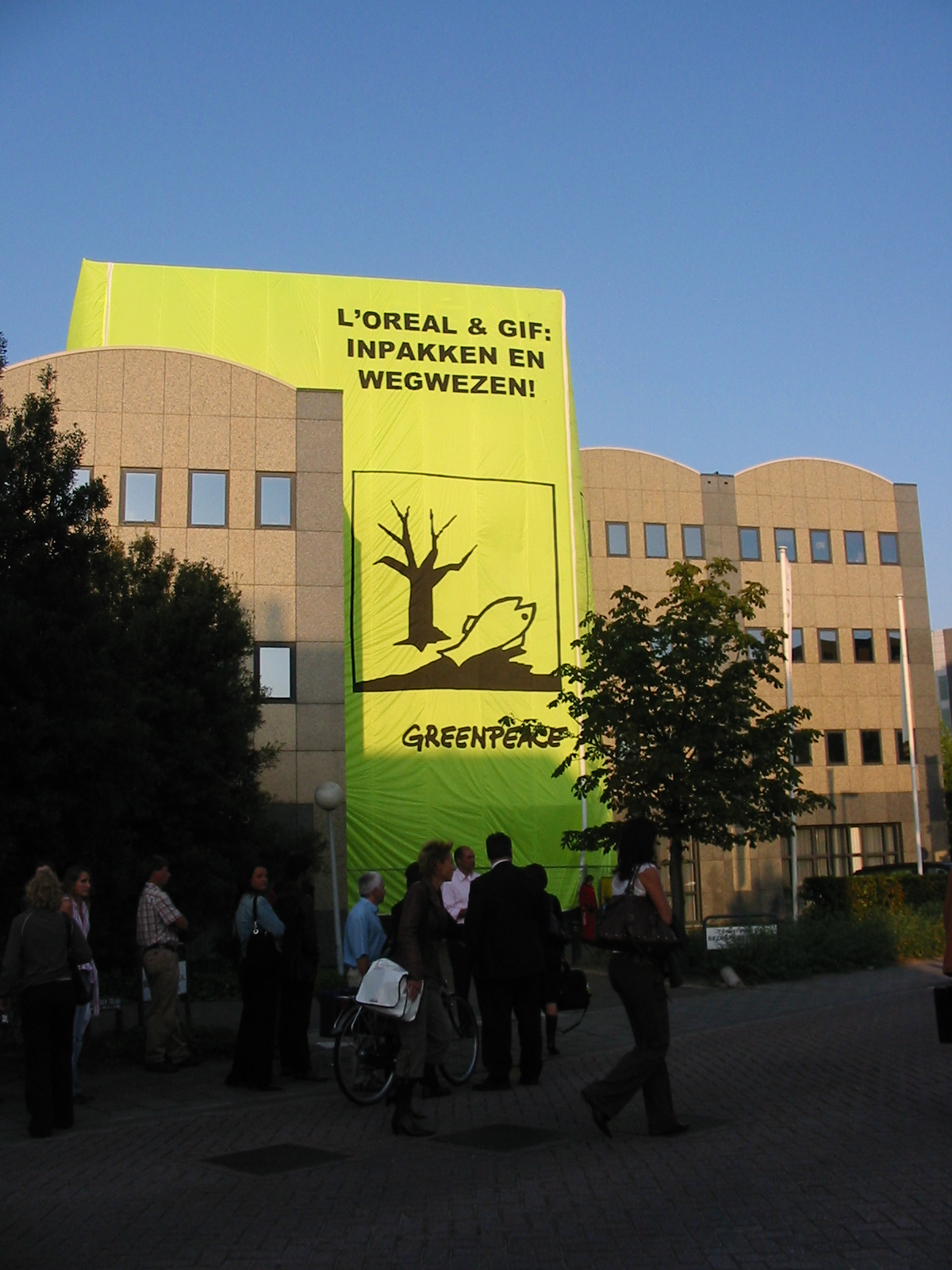 lolilolio